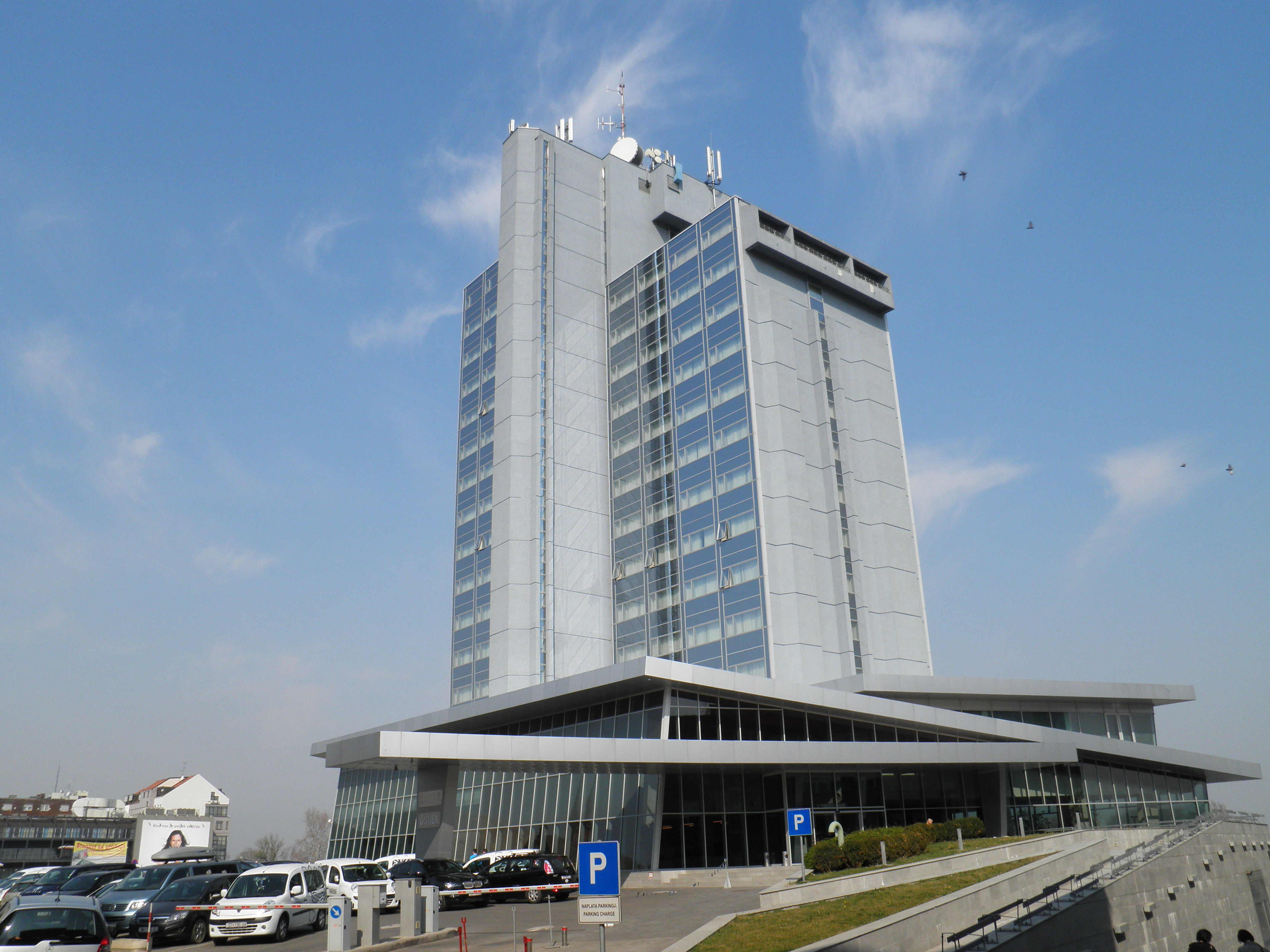 Hotel Osijek ****